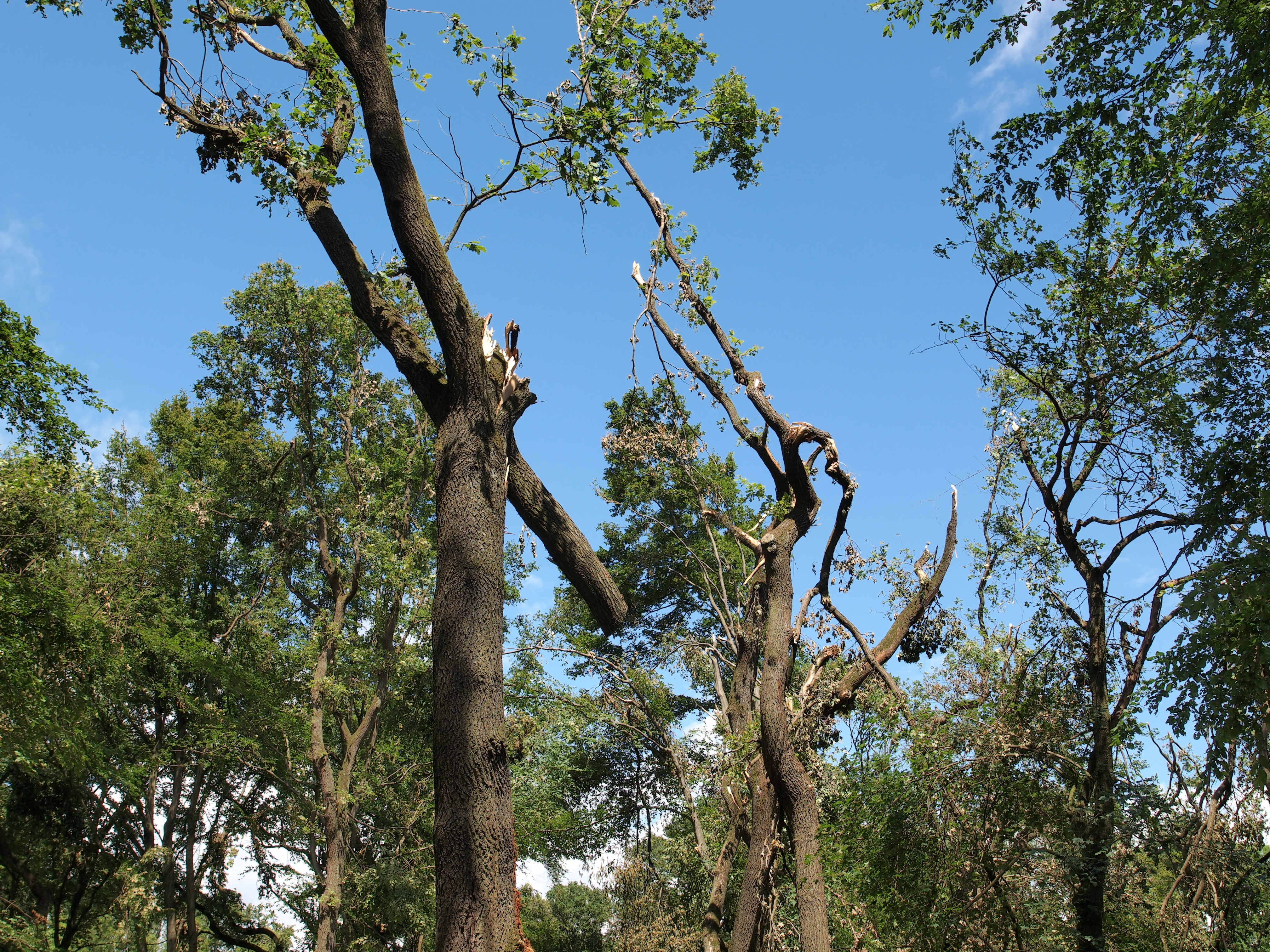 Naturschutzgebiet Resser Wäldchen in Herne (HER-004), im nordwestlichen Herne, Sturmschäden des Unwetters vom 9. Juni 2014